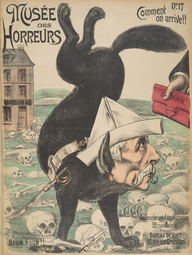 "Comment on arrive!!".